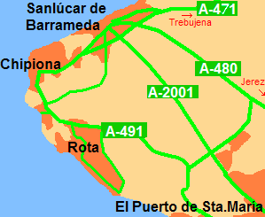 Mapa zonal A491 A480 A471 A2002 PUERTO SANTA Maria ROTA SanLUCAR CHIPIONA